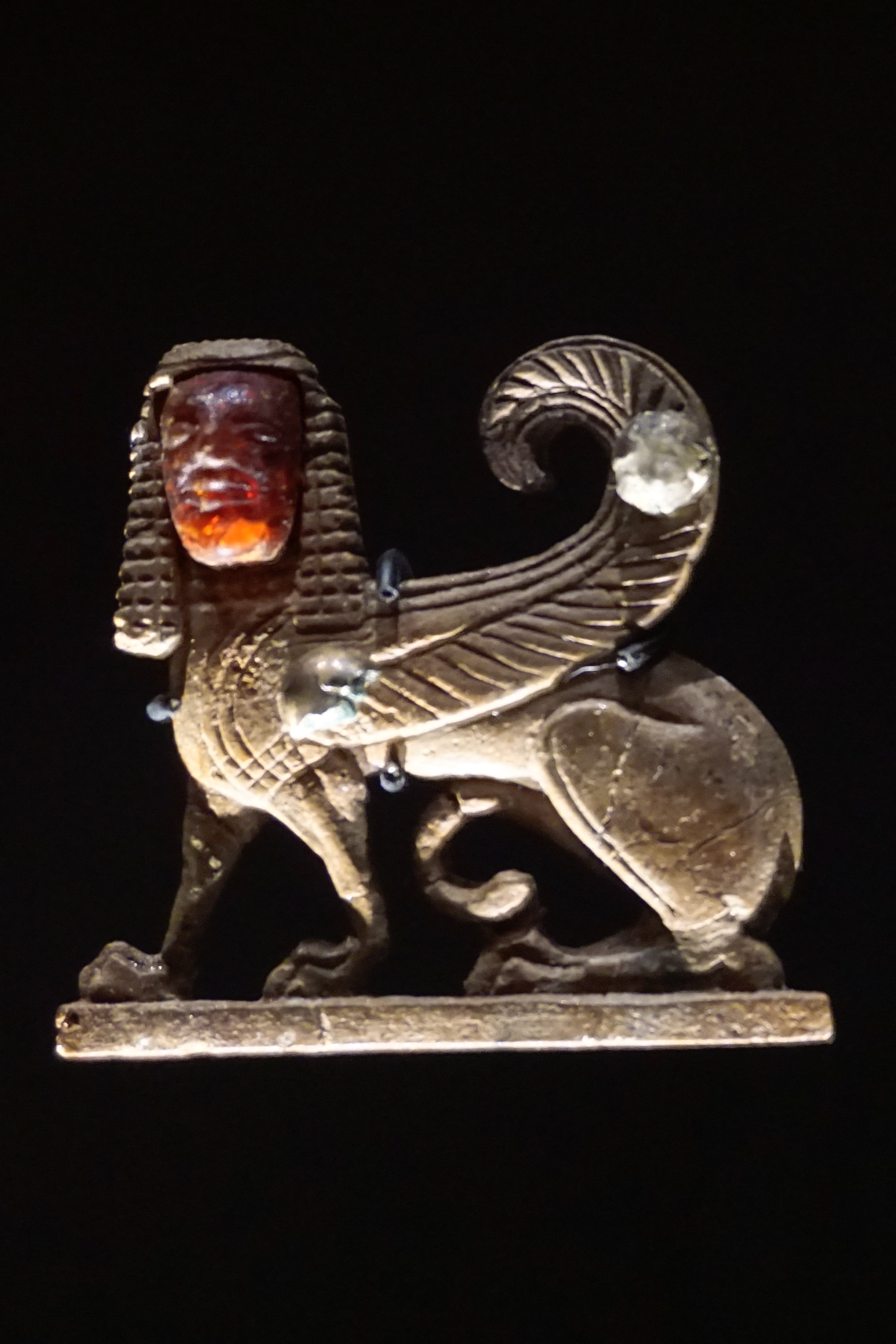 Prunkgrab Grafenbühl: Sphinx. Aus der Ausstellung Wahre Schätze - Kelten, im Landesmuseum Württemberg, Stuttgart.